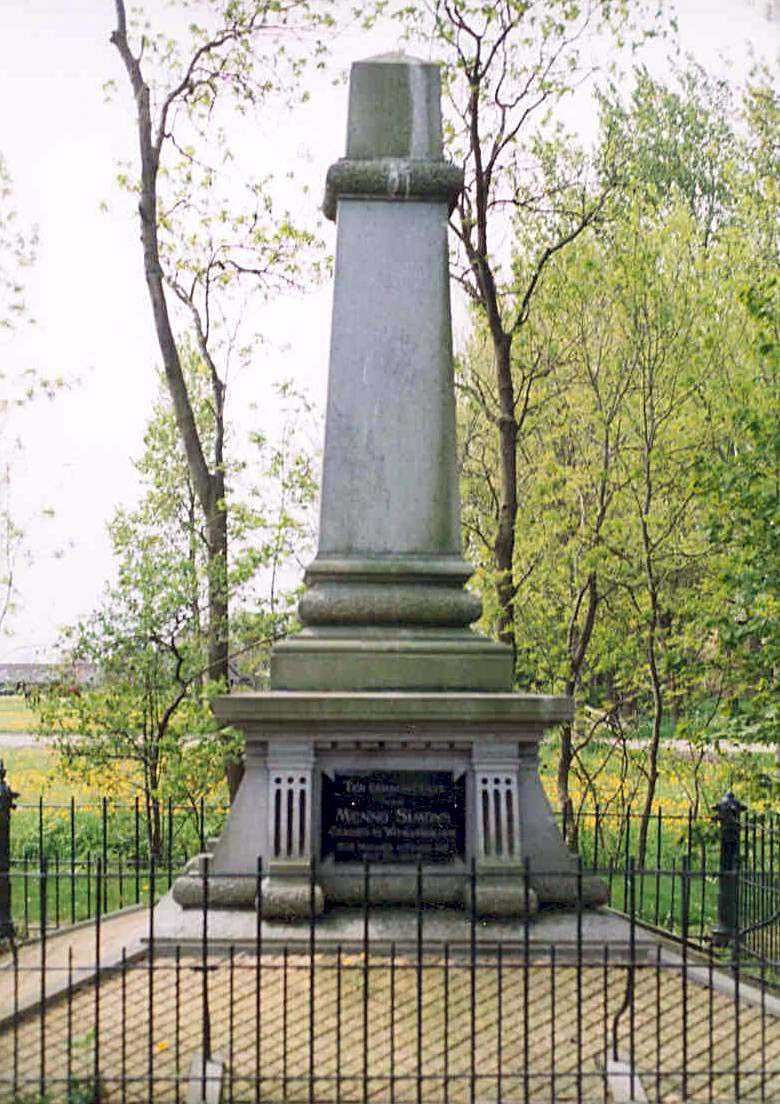 Onbekend,1879